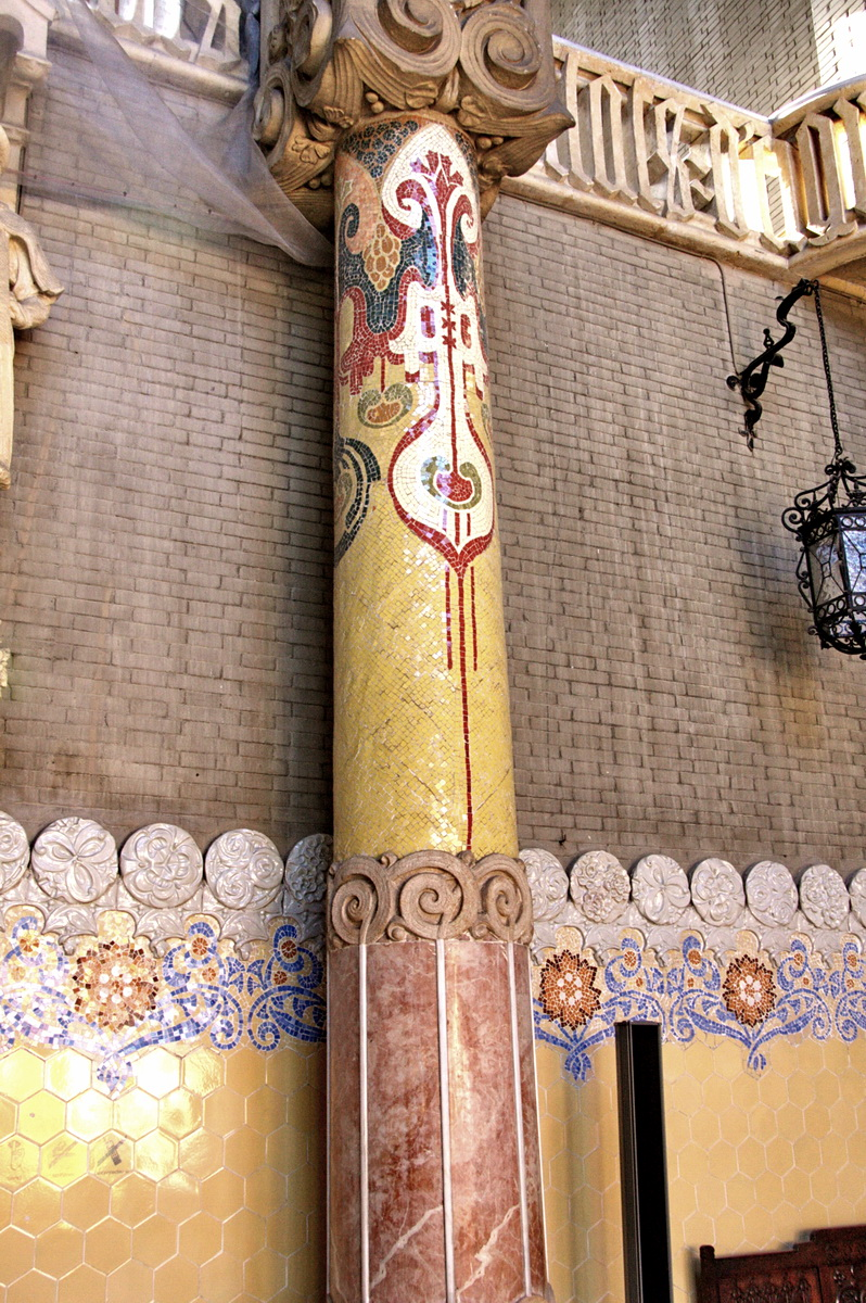 Columna decorada en mosaic del saló d'actes de l'hospital de Sant Pau (Barcelona, Catalunya), obra modernista de 1905. El mosaic és obra de Mario Maragliano